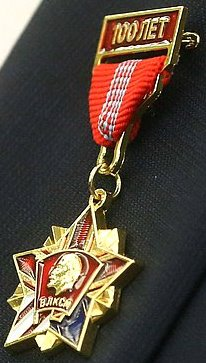 нагрудный почётный знак к 100-летию ВЛКСМ.